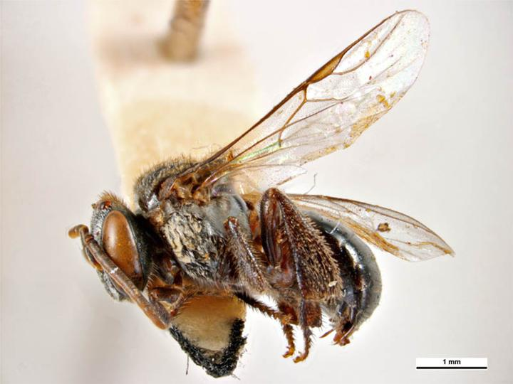 Tetragonula hockingsi drone